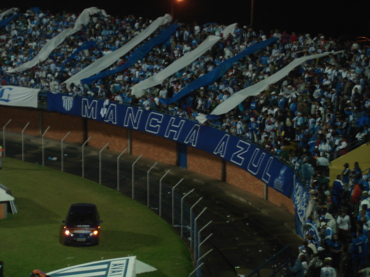 Mancha Azul do Avaí